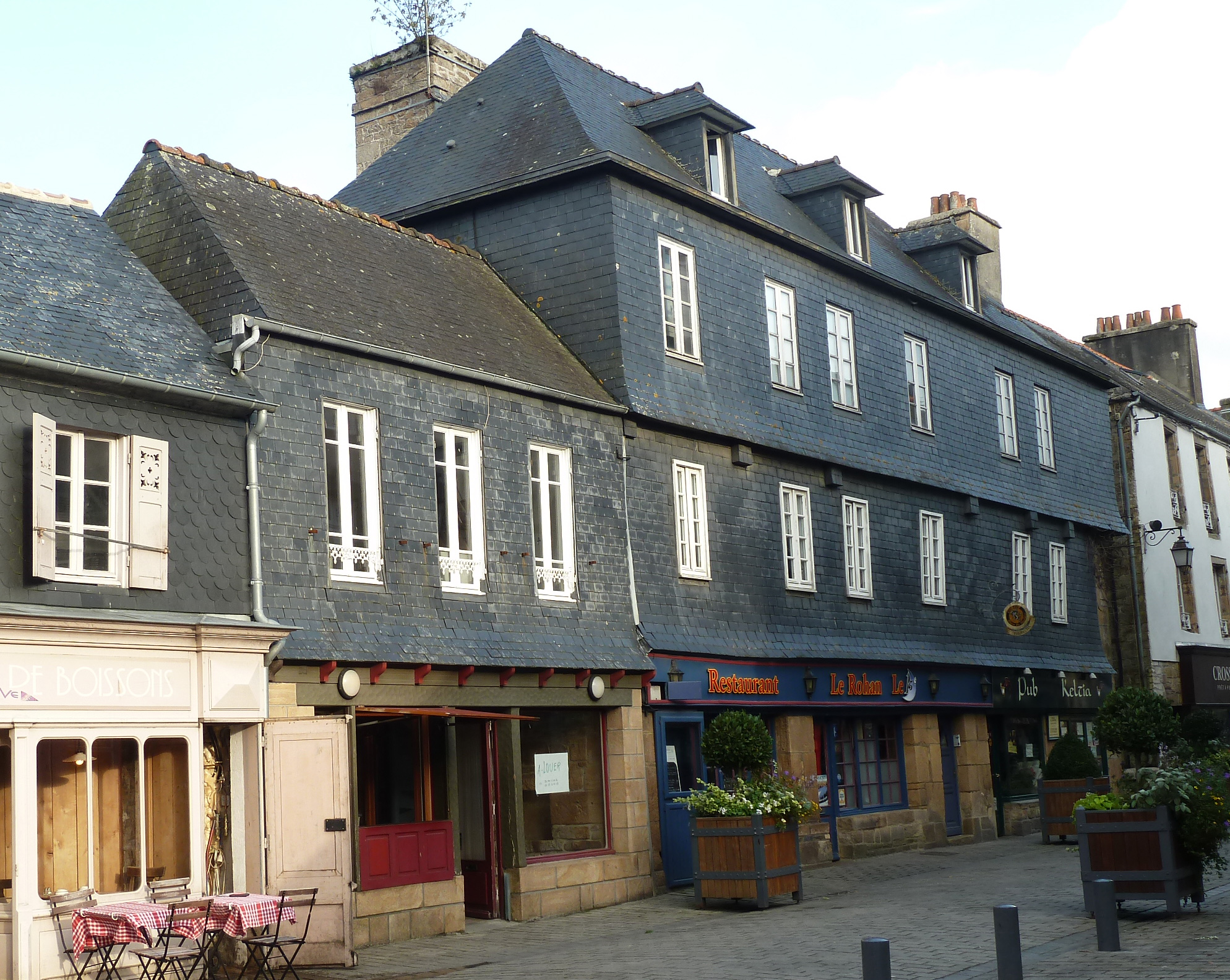 Rues du Pont de Rohan,Landerneau